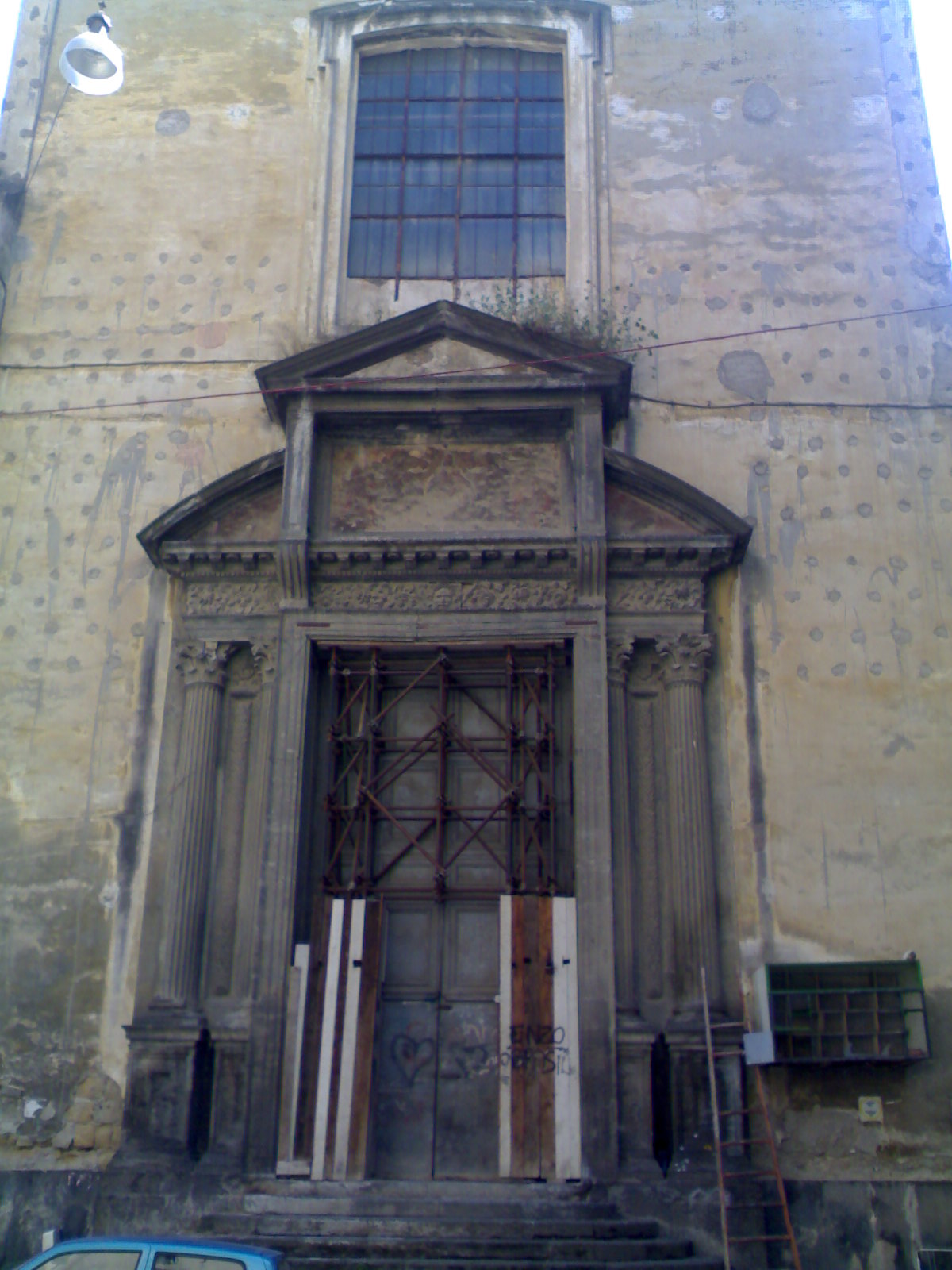 Portale d'ingresso Grazie a Caponapoli, Napoli